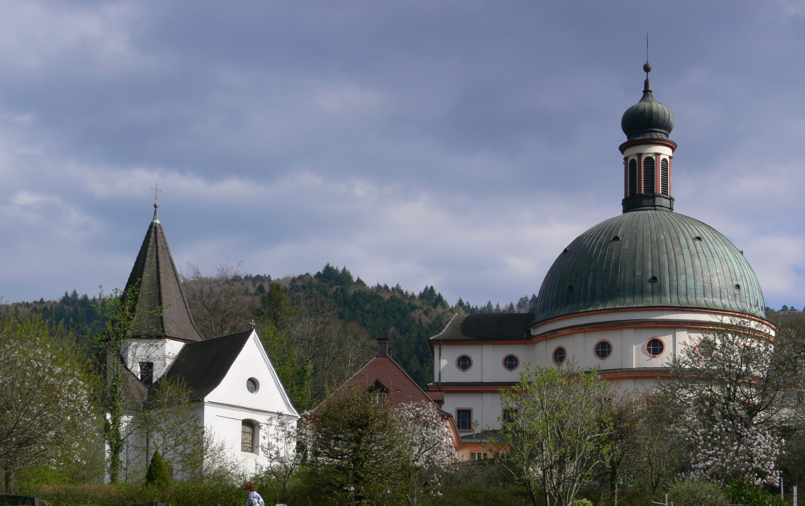 Kloster St. Trudpert, Gemeinde Münstertal, Landkreis Breisgau-Hochschwarzwald links: Trudpertskapelle, rechts: neue Klosterkirche (20. Jh.) der Schwestern vom Hl. Josef